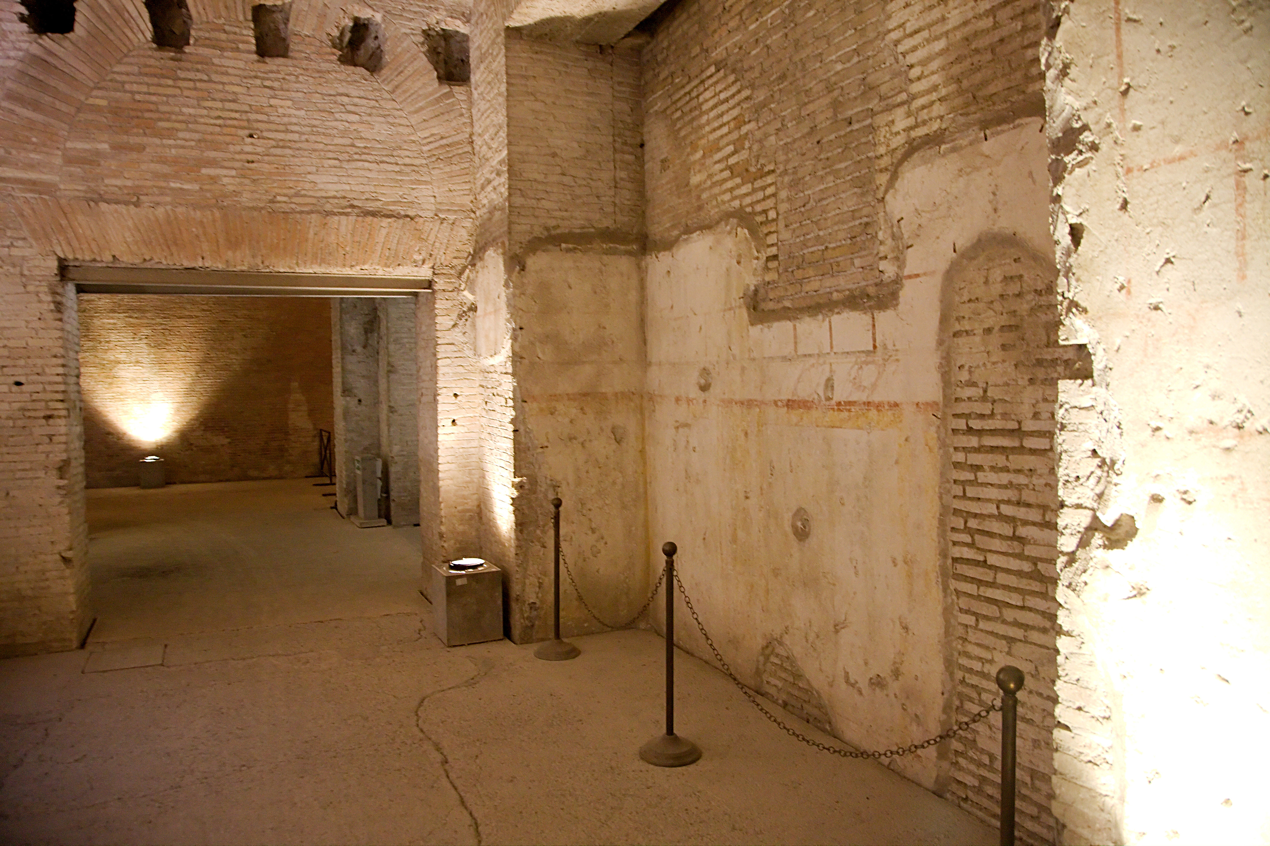 Domus Aurean maanalaisia holveja.